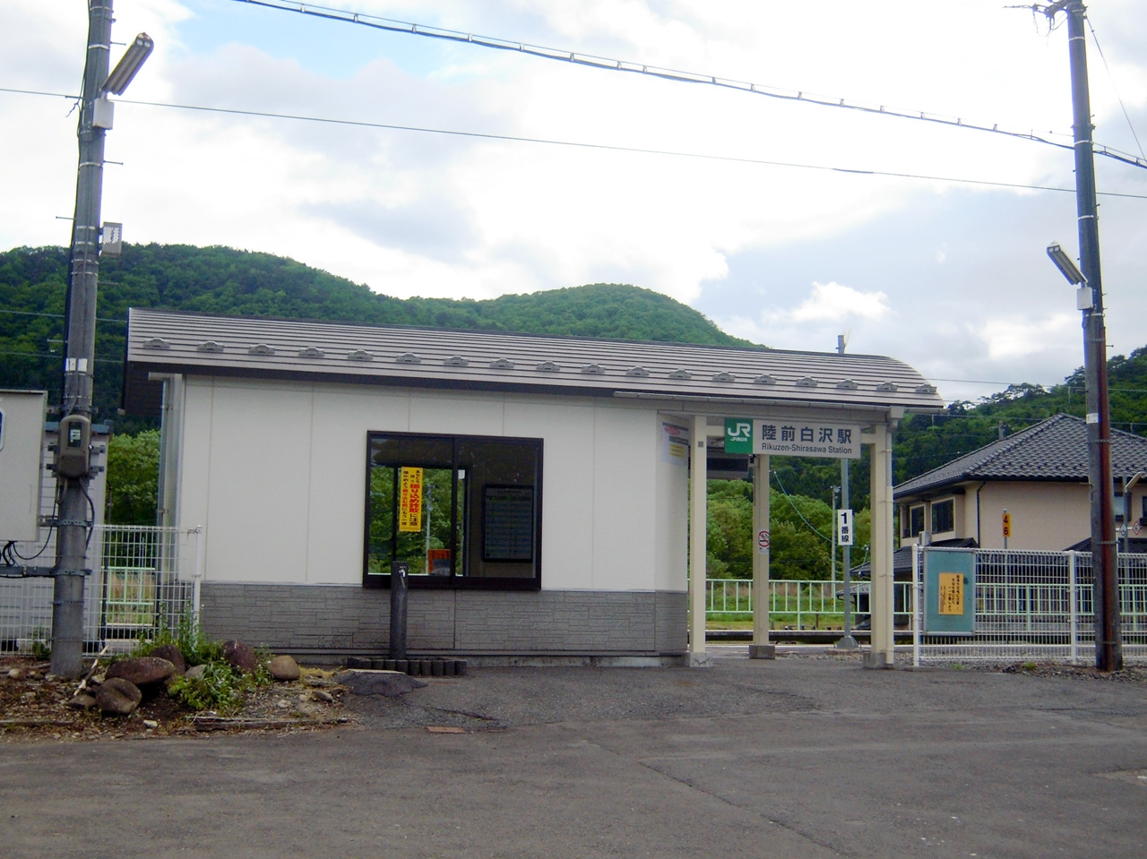 JR東日本仙山線 陸前白沢駅駅舎 (JR East Senzan line Rikuzen-Shirasawa station)